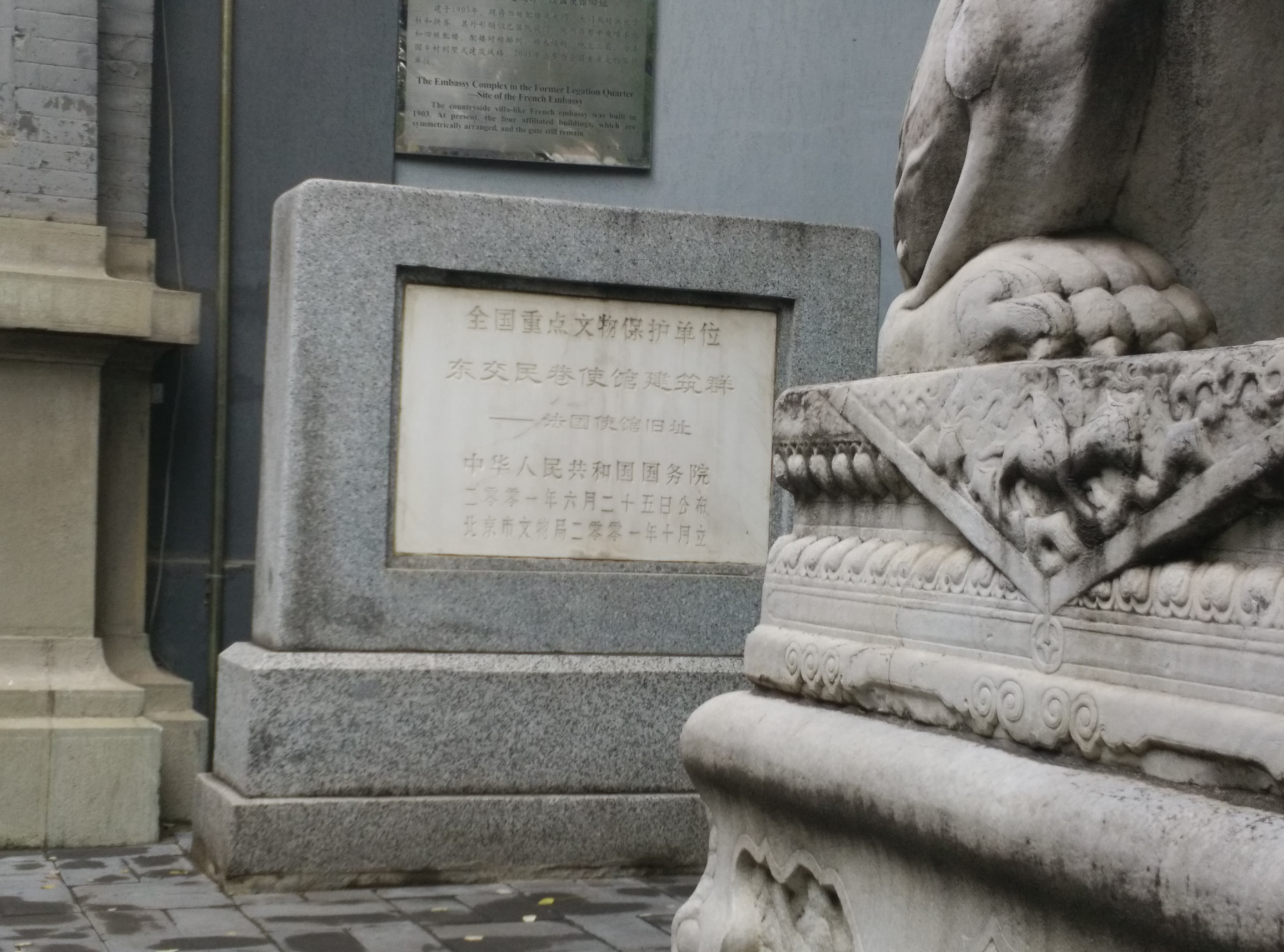 中文（中国大陆）: 法国使馆文保碑，摄于11月7日